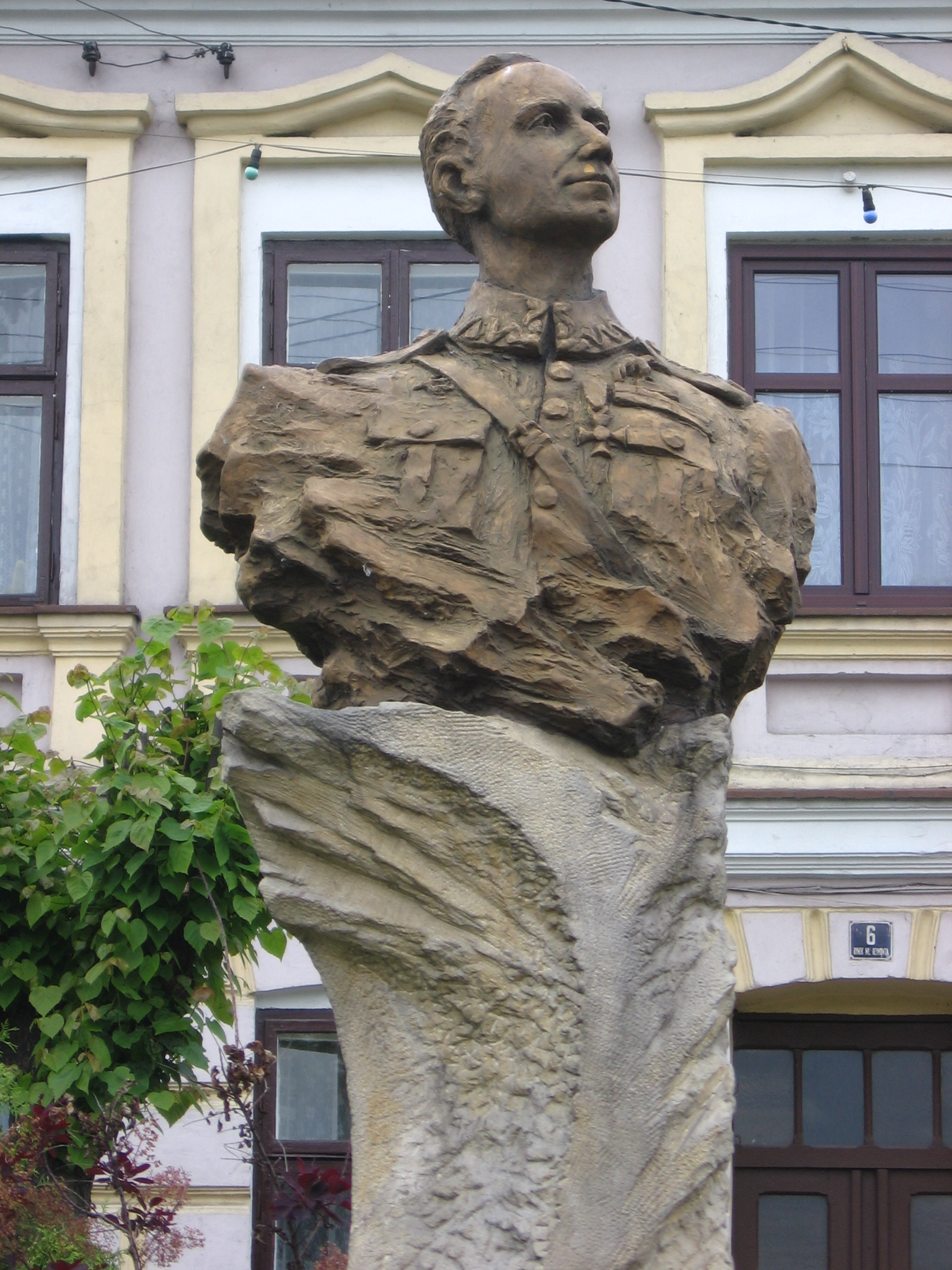 pomnik płk. pilota Stanisława Skarżyńskiego na głównym placu w mieście Warta